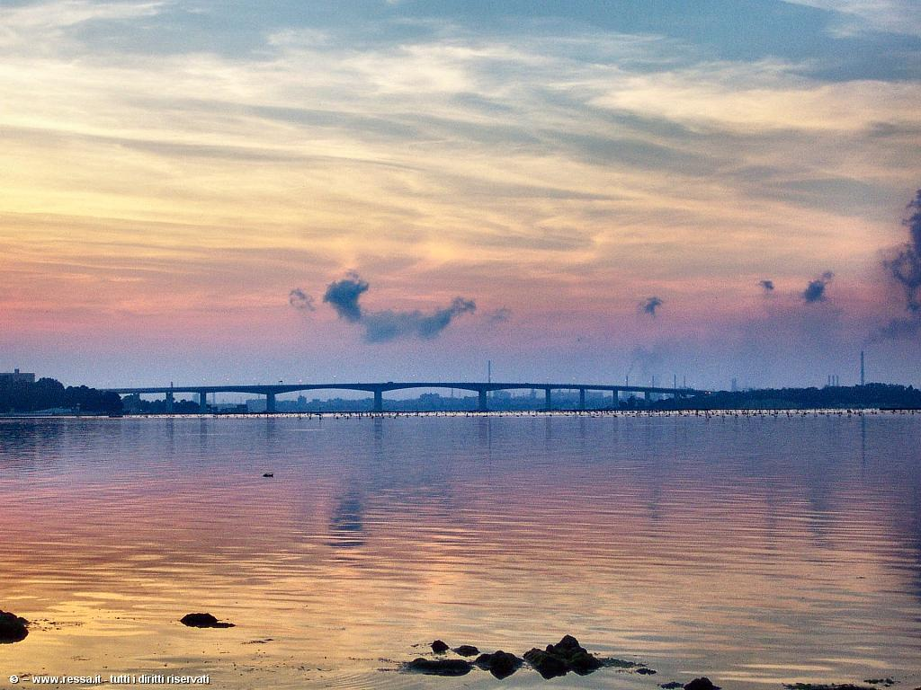 Ponte Punta Penna Pizzone di Taranto visto al tramonto